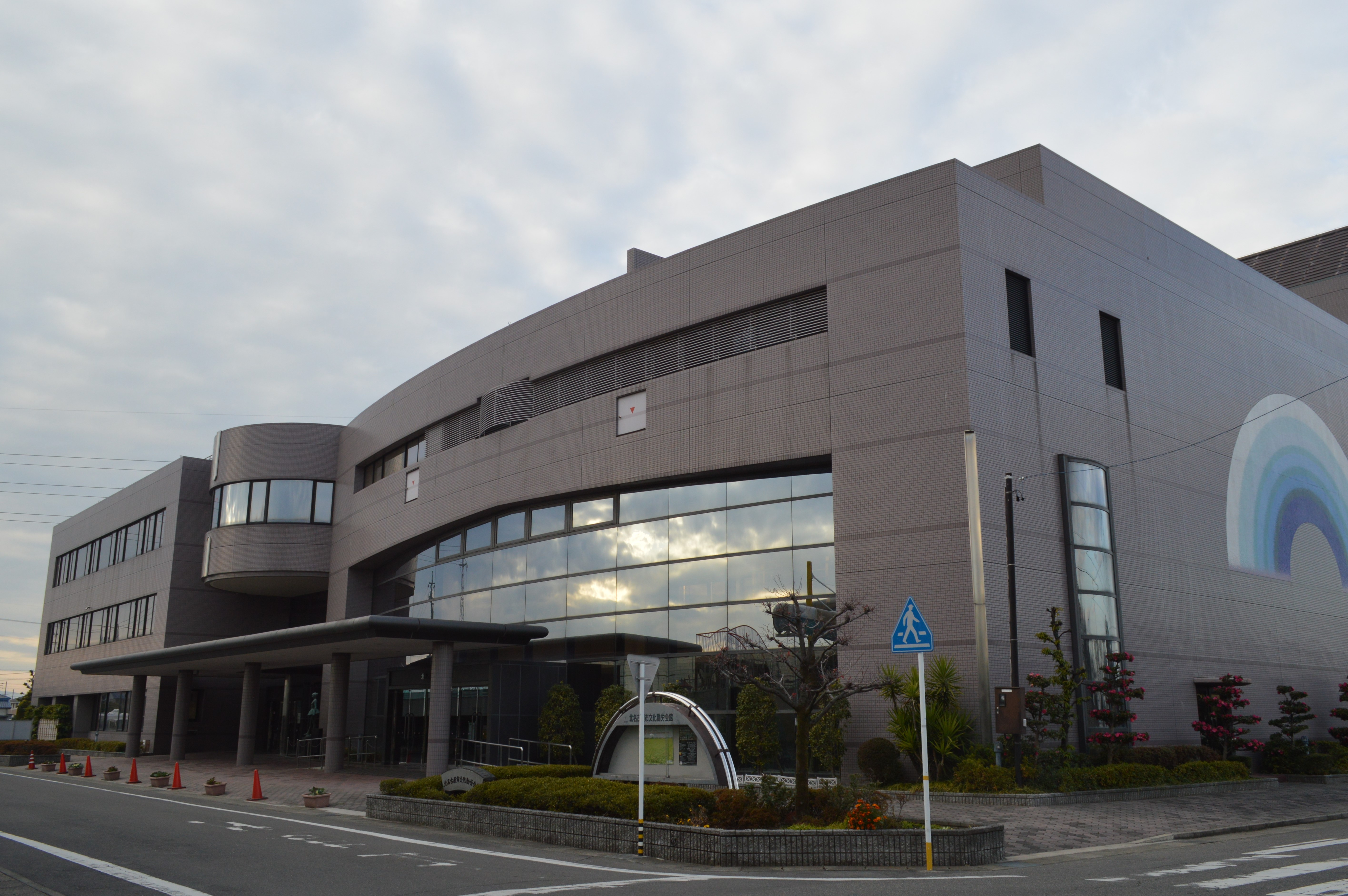 旧西春町域にある北名古屋市西図書館。